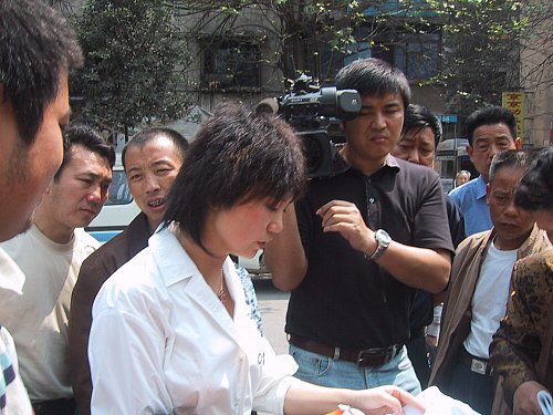 广东的南方电视采访zh:2007年重庆杨家坪拆迁事件